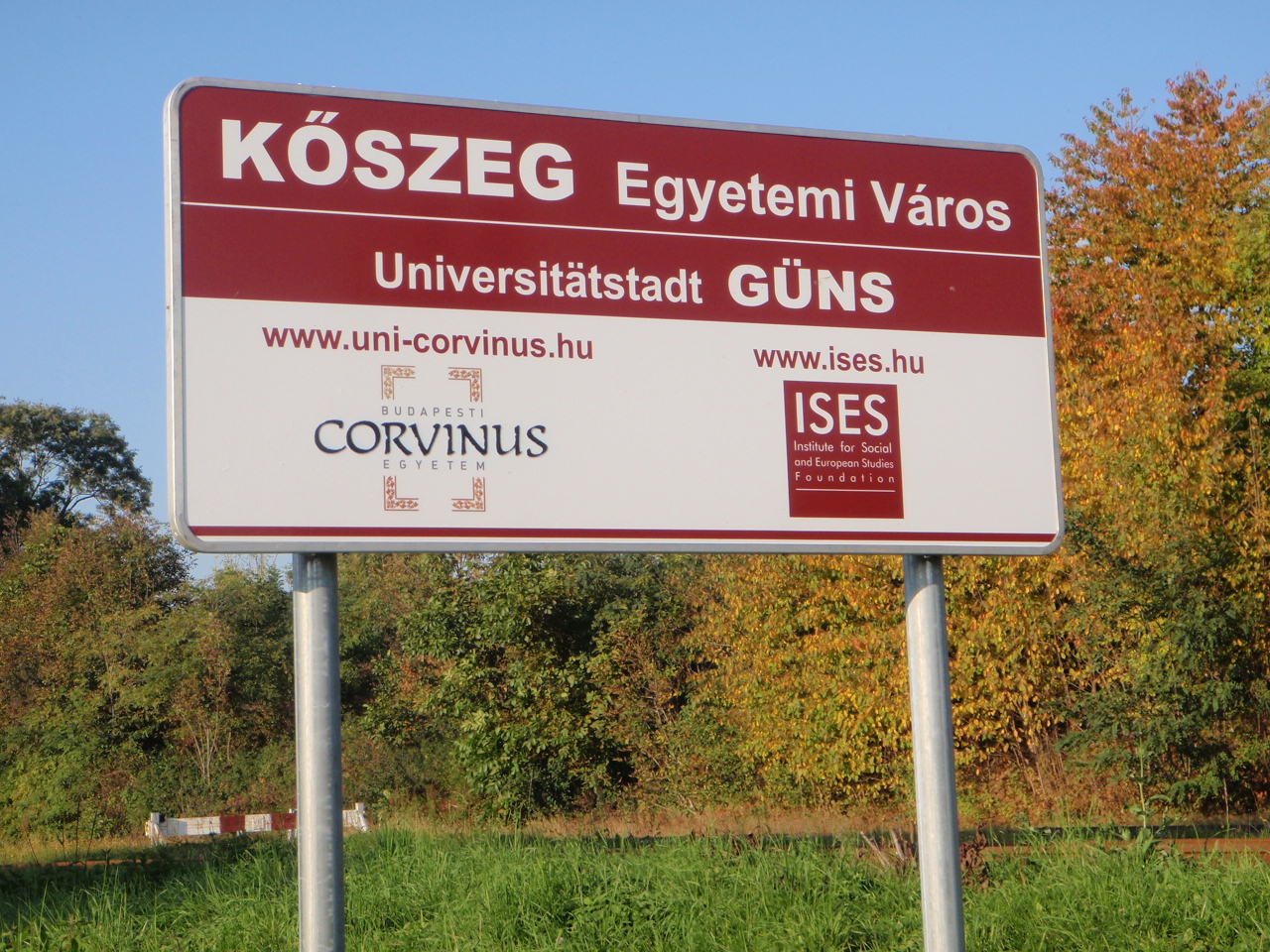 Universitätstadt Güns